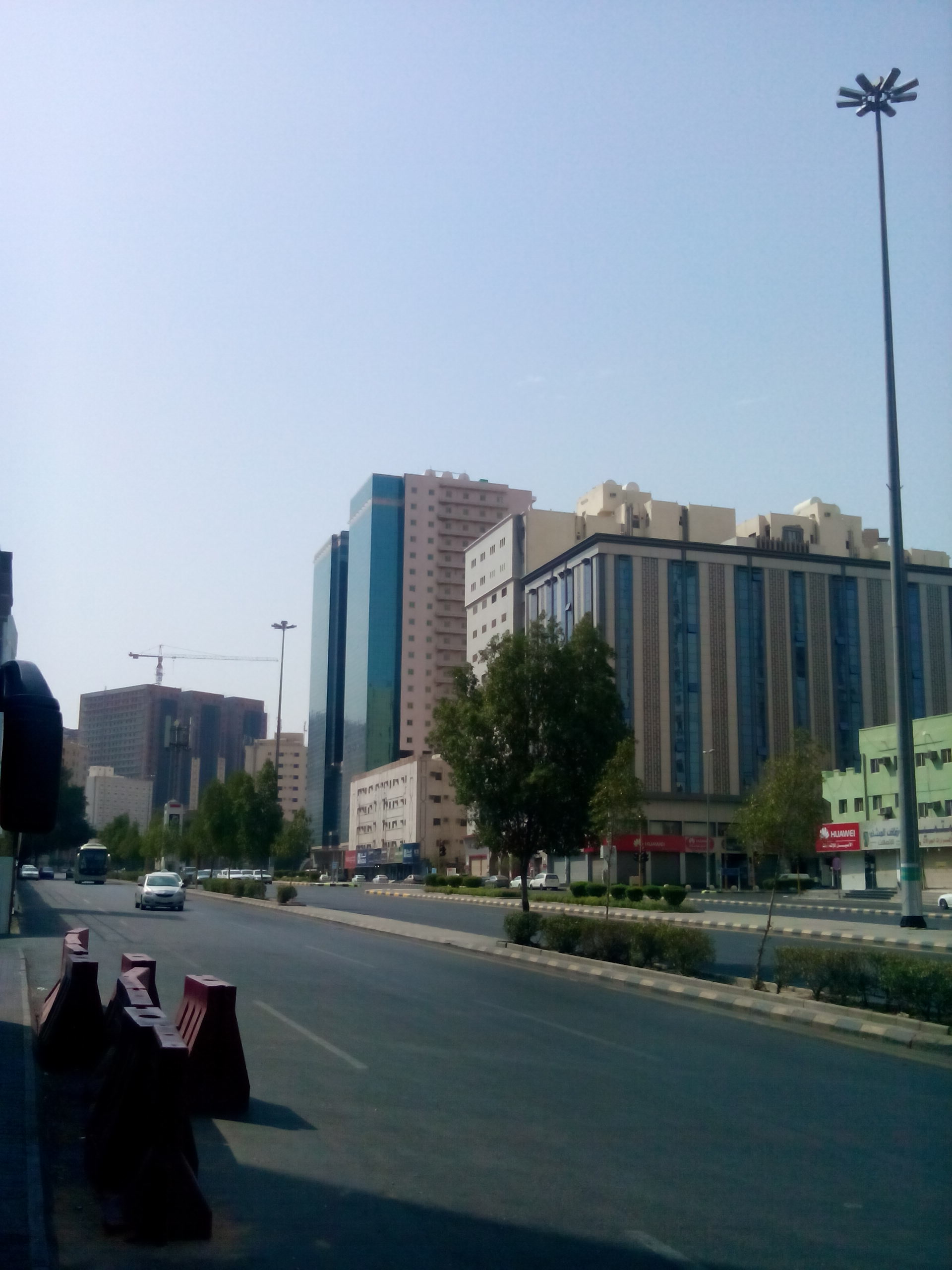 مشهد لشارع في حي العزيزية في مدينة مكة 2018